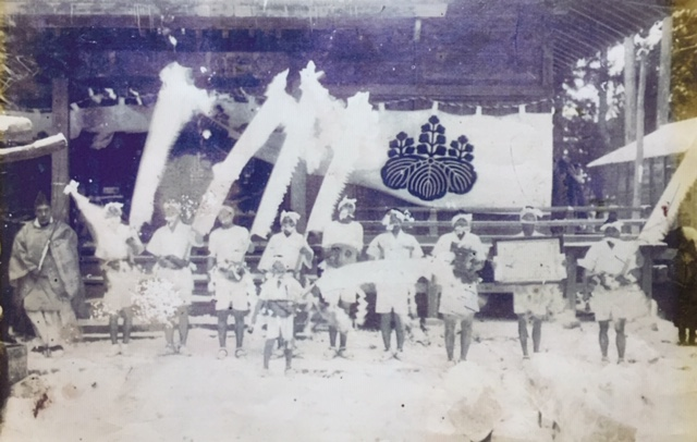 紫波町（旧紫波町）の裸参り-戦前